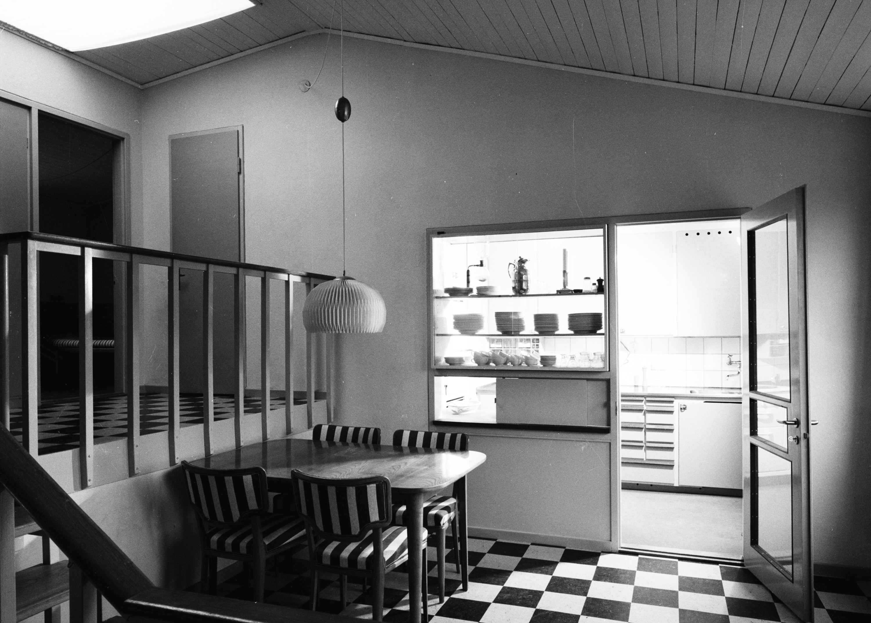 Atlantisområdet, Vällingbyhöjden, interiör